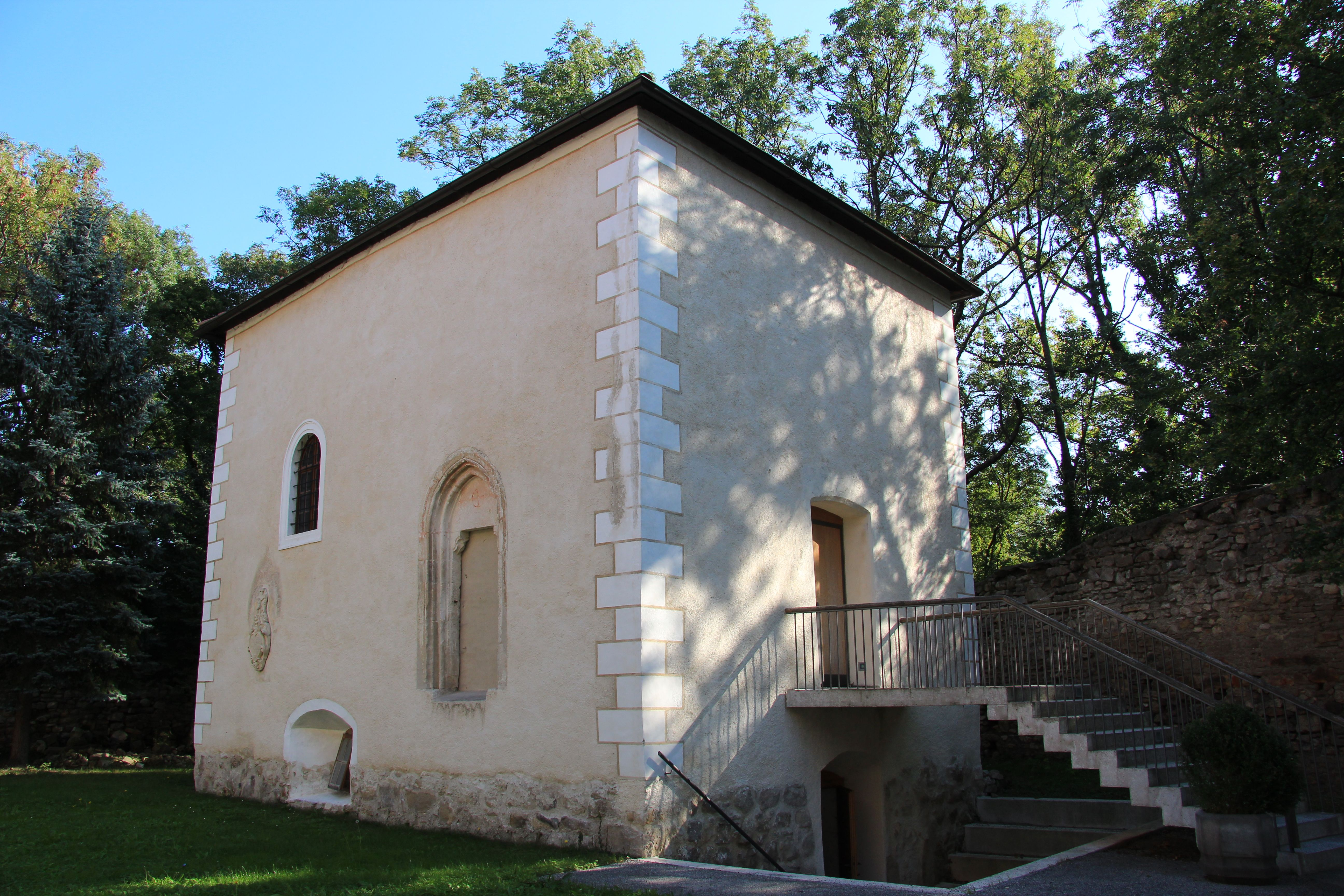 Barbarakapelle ehem. Karner bei der Pfarrkirche Unterwaltersdorf